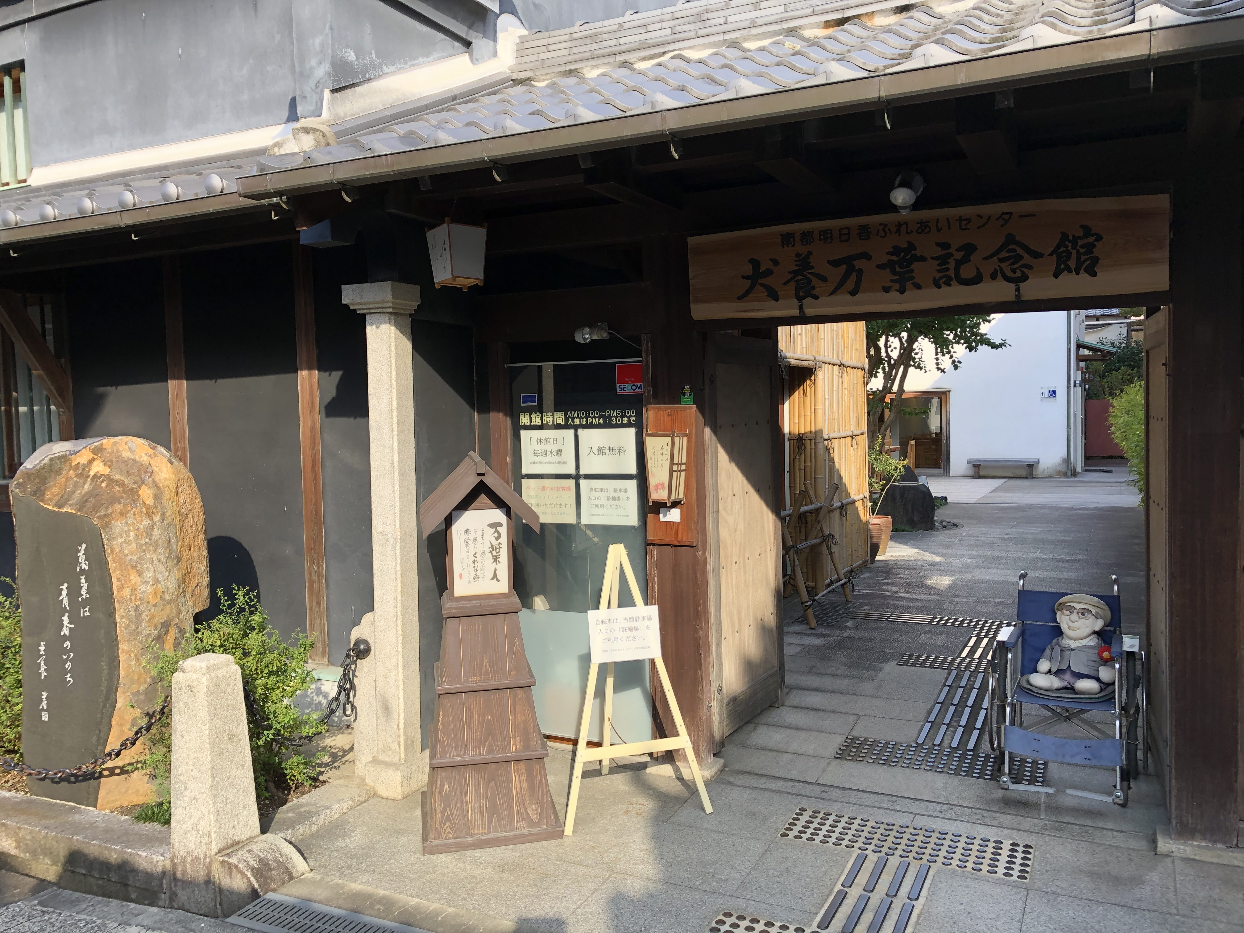 犬養万葉記念館 (2019年10月)